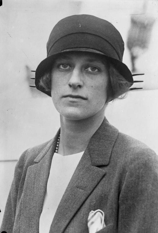 Diese Frau zahlt die höchsten Steuern in Amerika! Mrs. Isabelle Rockefeller, eine Nichte des bekannten Petroleum-Königs zahlt dem amerikanischen Staat jährlich ca. 180.000 Dollars Steuern, was ungefähr der Summe von M 800.000,-- entspricht.